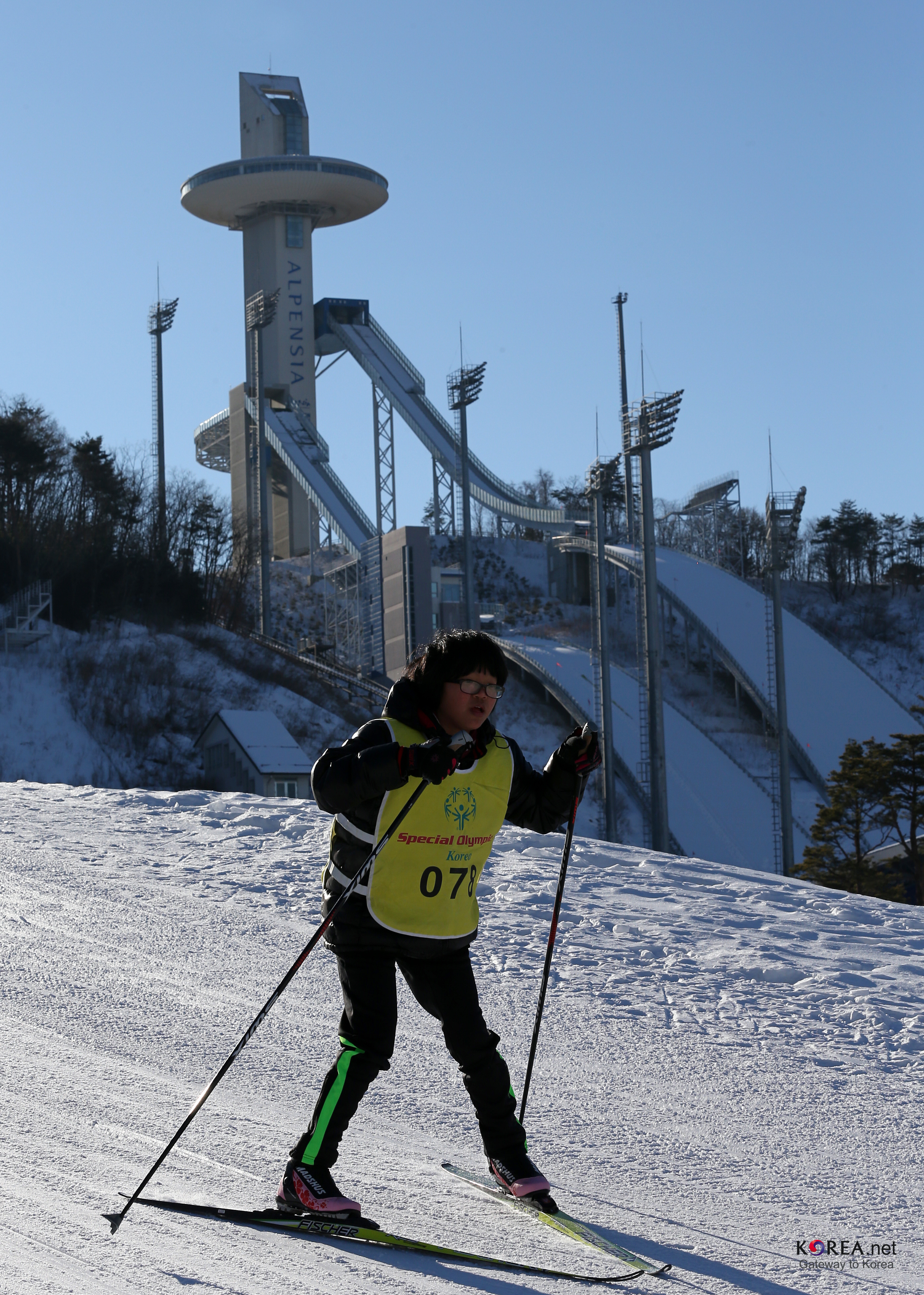 2013 평창스페셜올림픽 미디어데이 평창 알펜시아 문화체육관광부 해외문화홍보원 전한